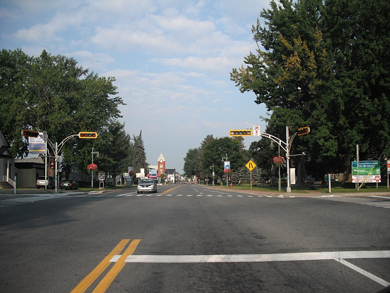 Vue de Louiseville, dans l'ouest de la Mauricie, à partir de la route 138 direction ouest (Avenue Saint-Laurent), à l'intersection avec la route 349 (Rue Notre-Dame).